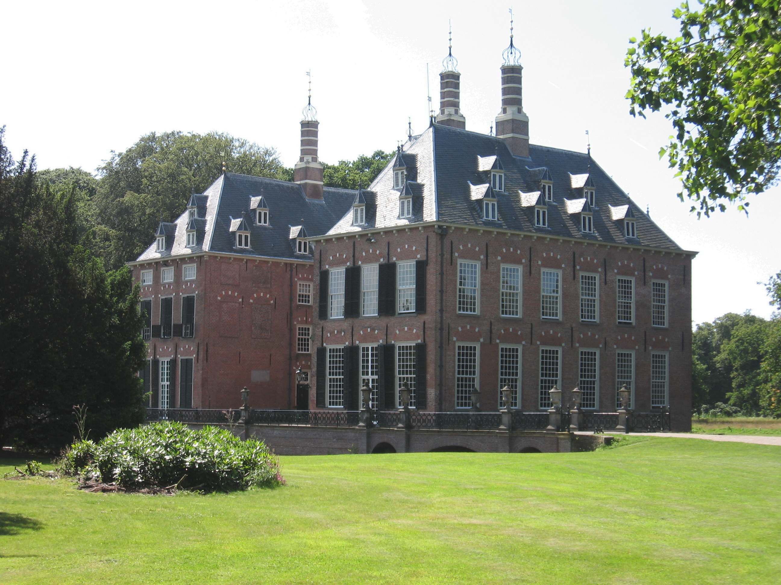 Kasteel Duivenvoorde, Voorschoten